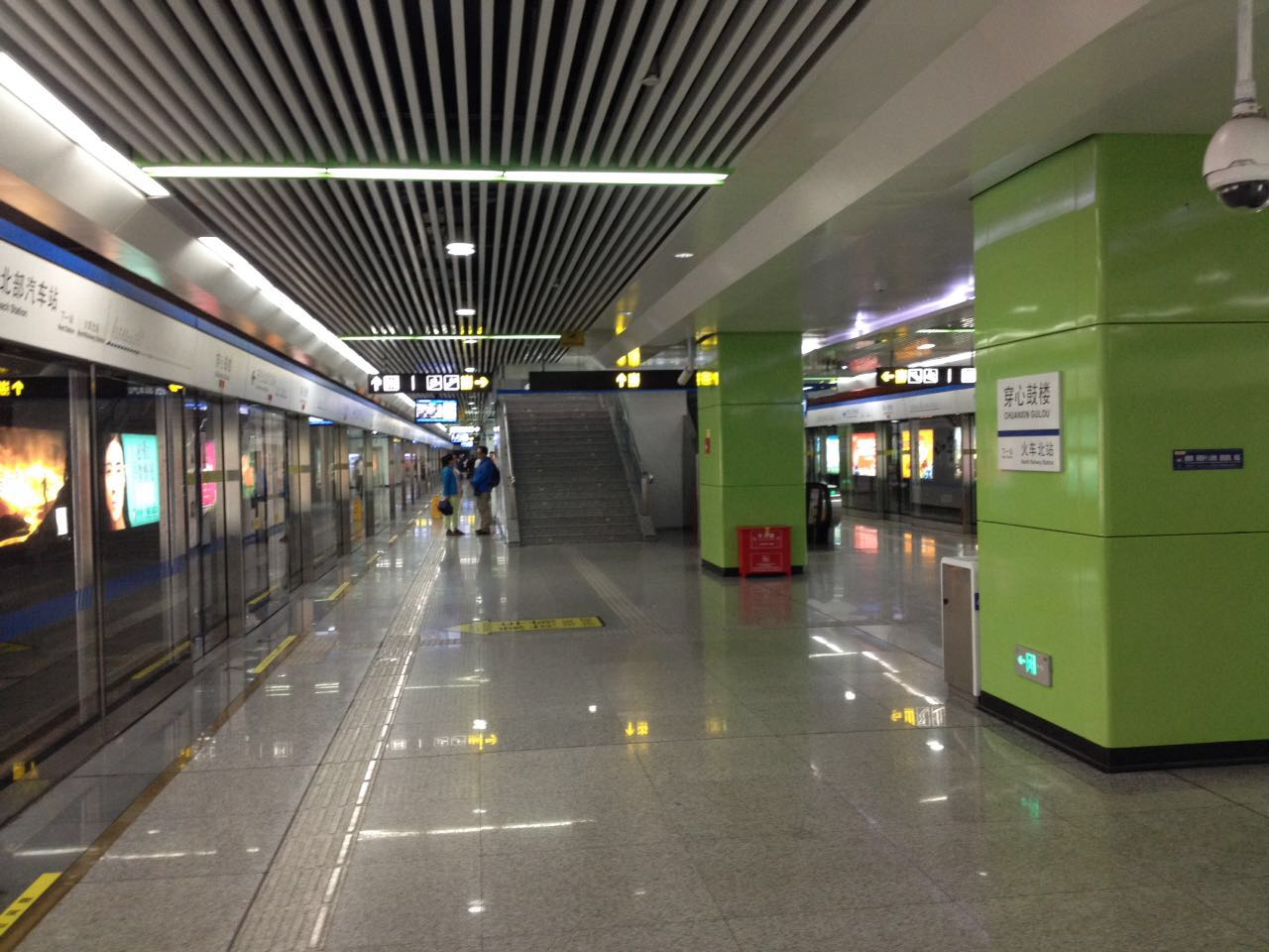 昆明地铁穿心鼓楼站。